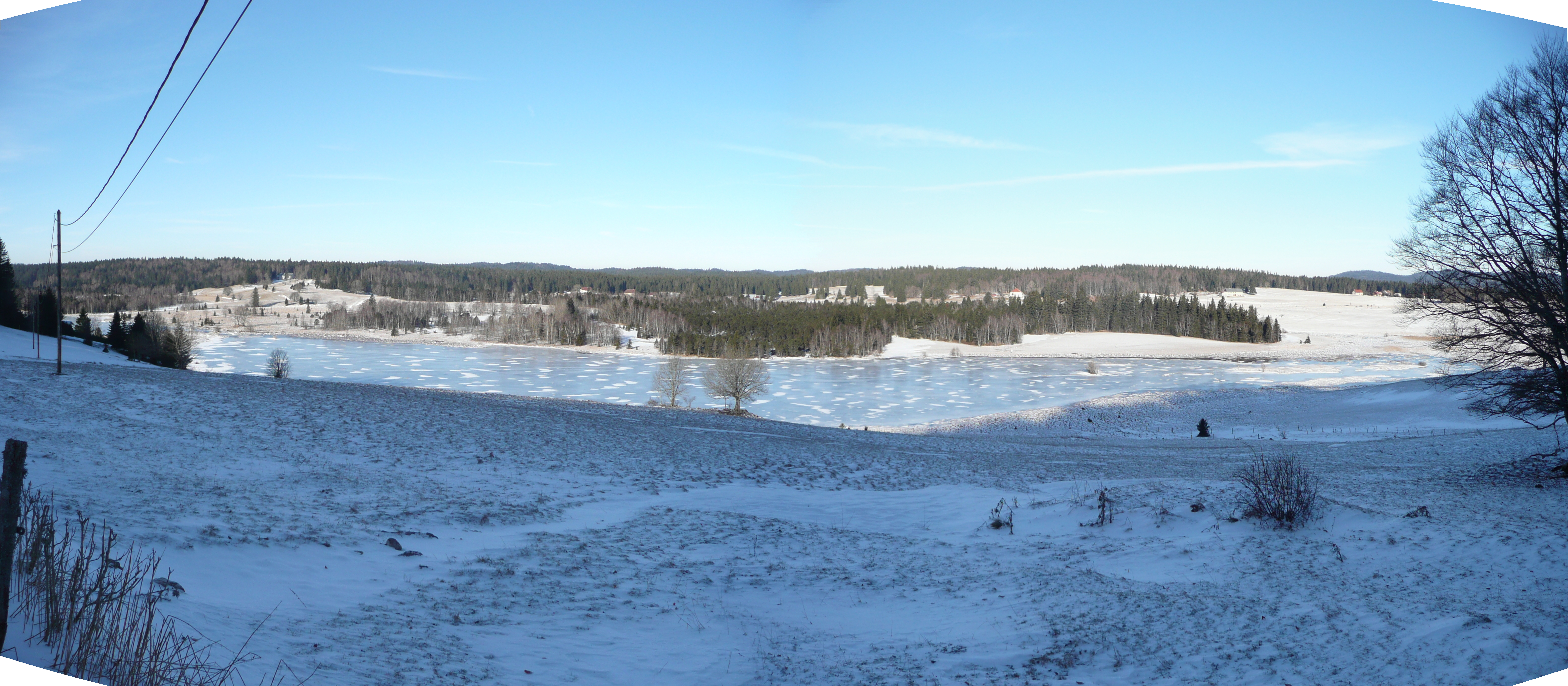 photo panoramique du lac des mortes sur la commune de Chapelle des bois (Doubs), prise du lieu dit Chez L'Aimé.